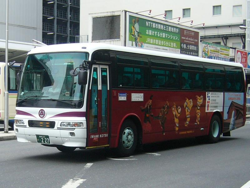 登録番号 島根200か・227 石見交通バス所属 新広益線用 2006年6月4日 広島バスセンターにて撮影 撮影者 Tokatsu kokubu